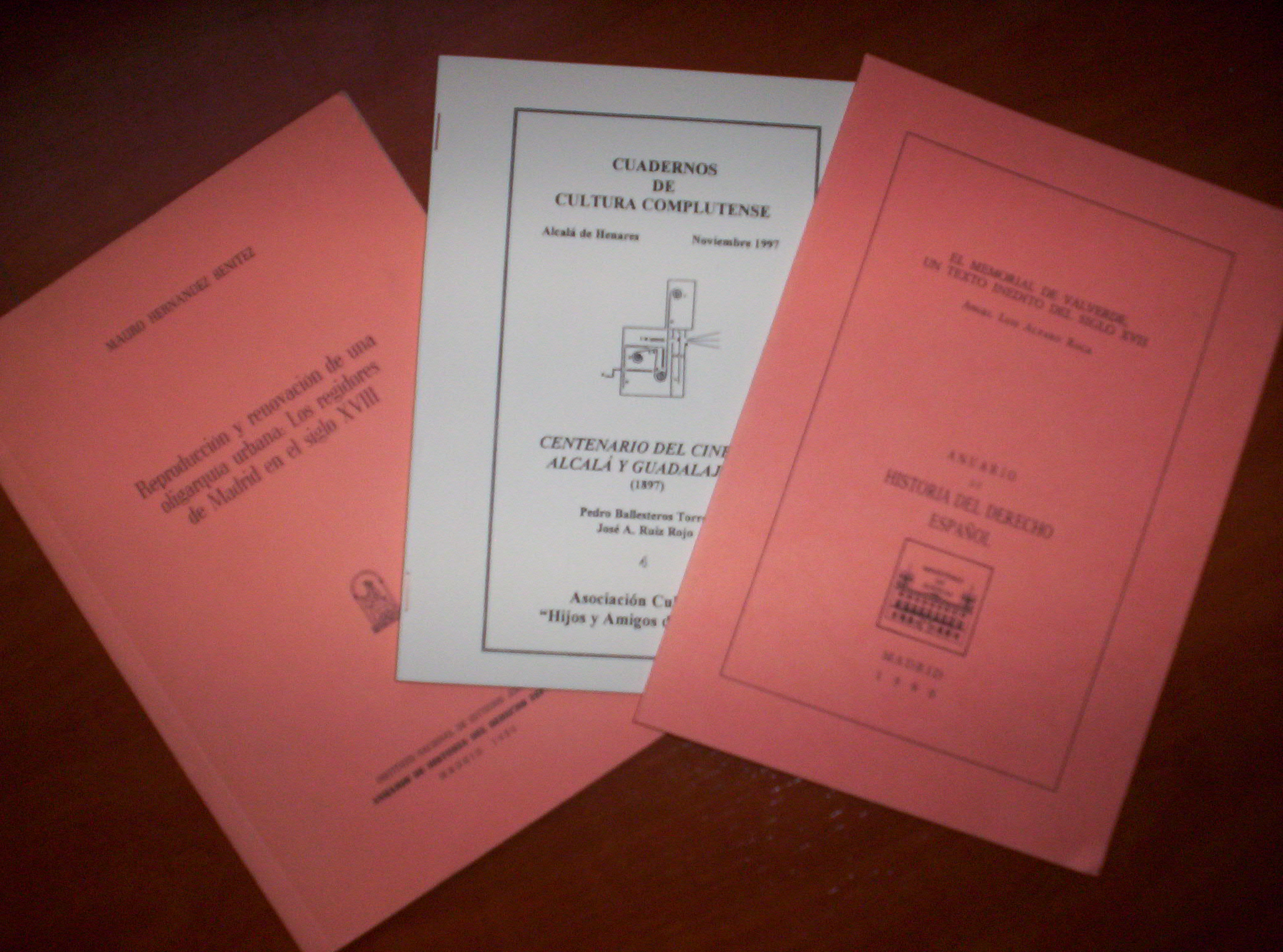 Separatas de revistas de historia: Anuario de Historia del Derecho Español (Mauro Hernández -Reproducción y renovación de una oligarquía urbana...- y Ángel Luis Alfaro -El memorial de Valverde...-) y Cuadernos de Cultura Complutense (Pedro Ballesteros y Jose A. Ruiz Rojo -Centenario del Cine...-)